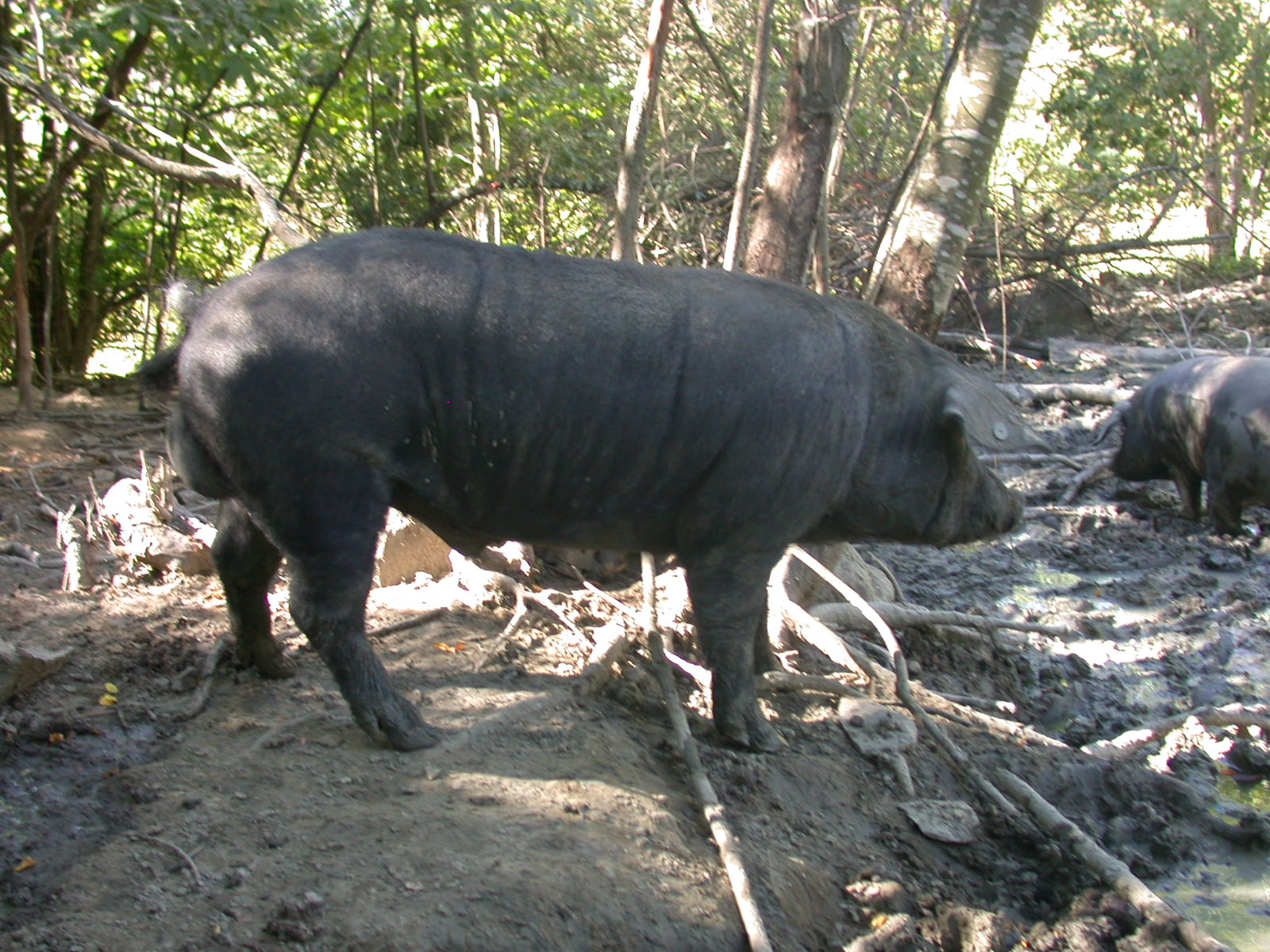 Fotografia di un nero di Parma